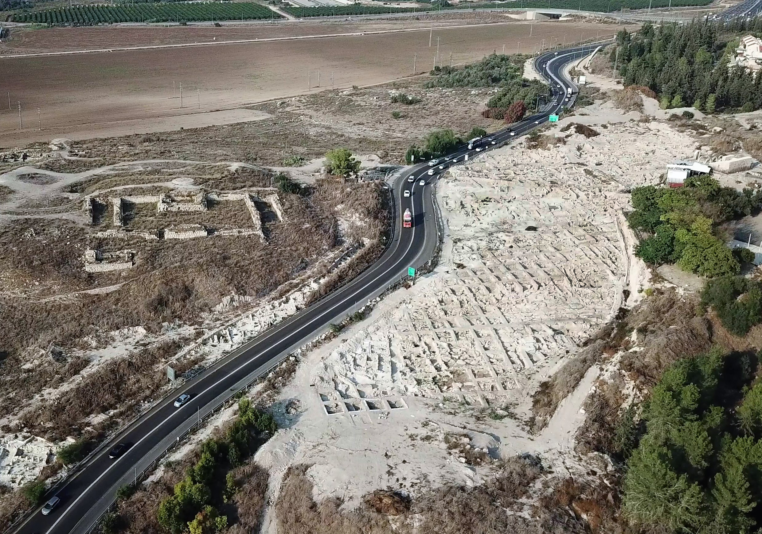 תל בית שמש משמאל, והחפירות הארכיאולוגיות מימין.